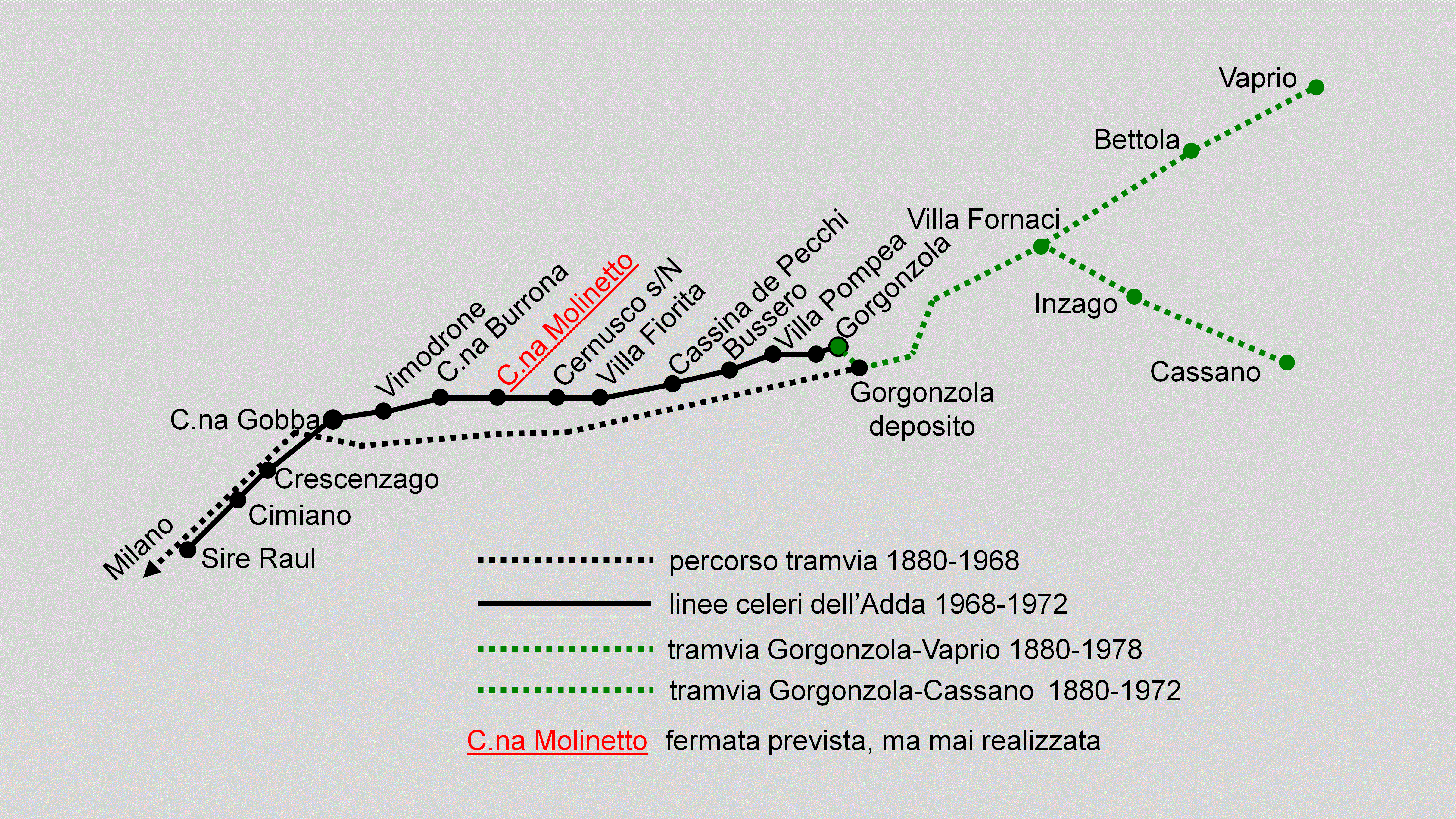 Mappa celeri adda (autore marco lambruschi)